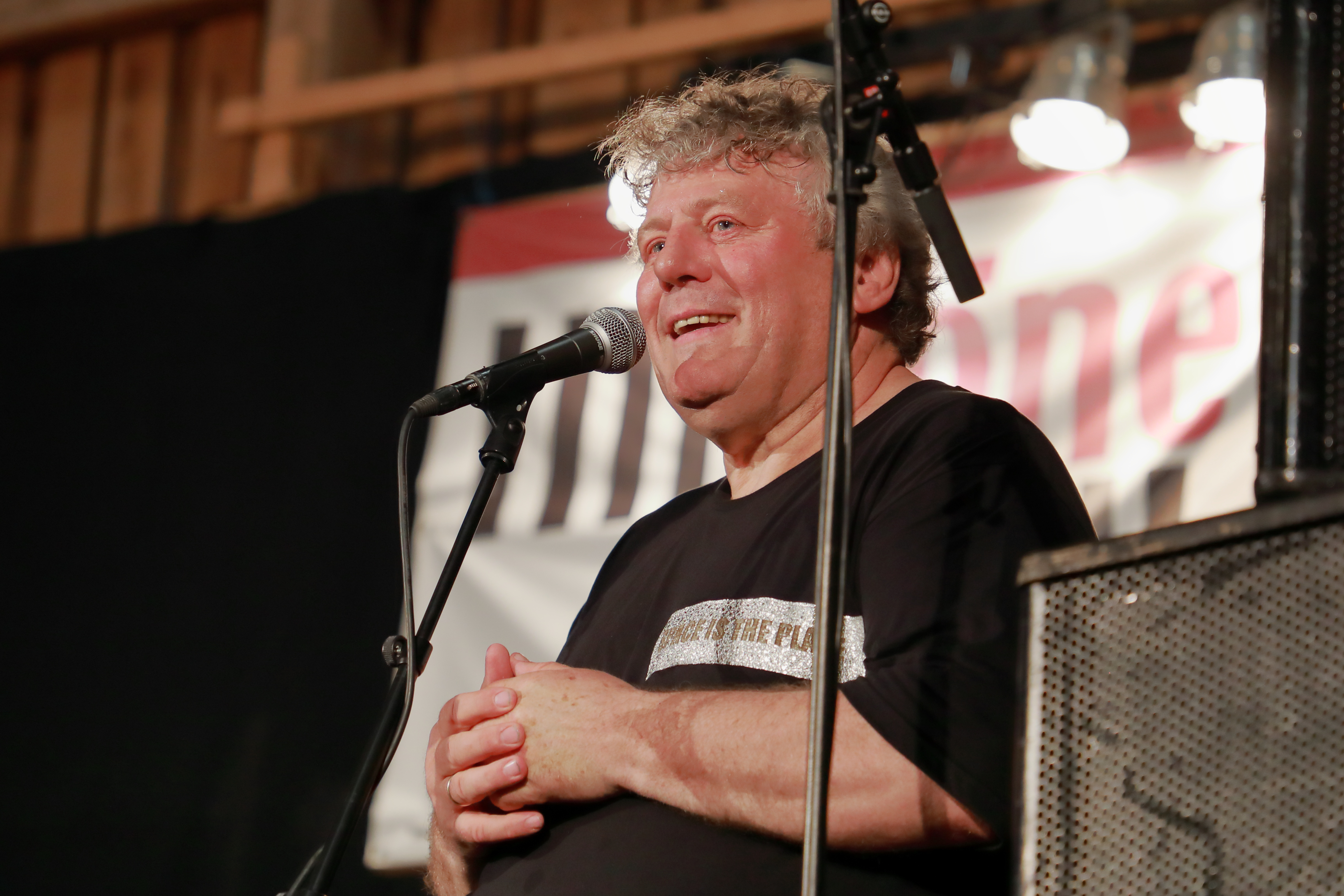 Paul Zauner begrüßt die Gäste und Musiker des INNtöne Jazzfestivals 2019.